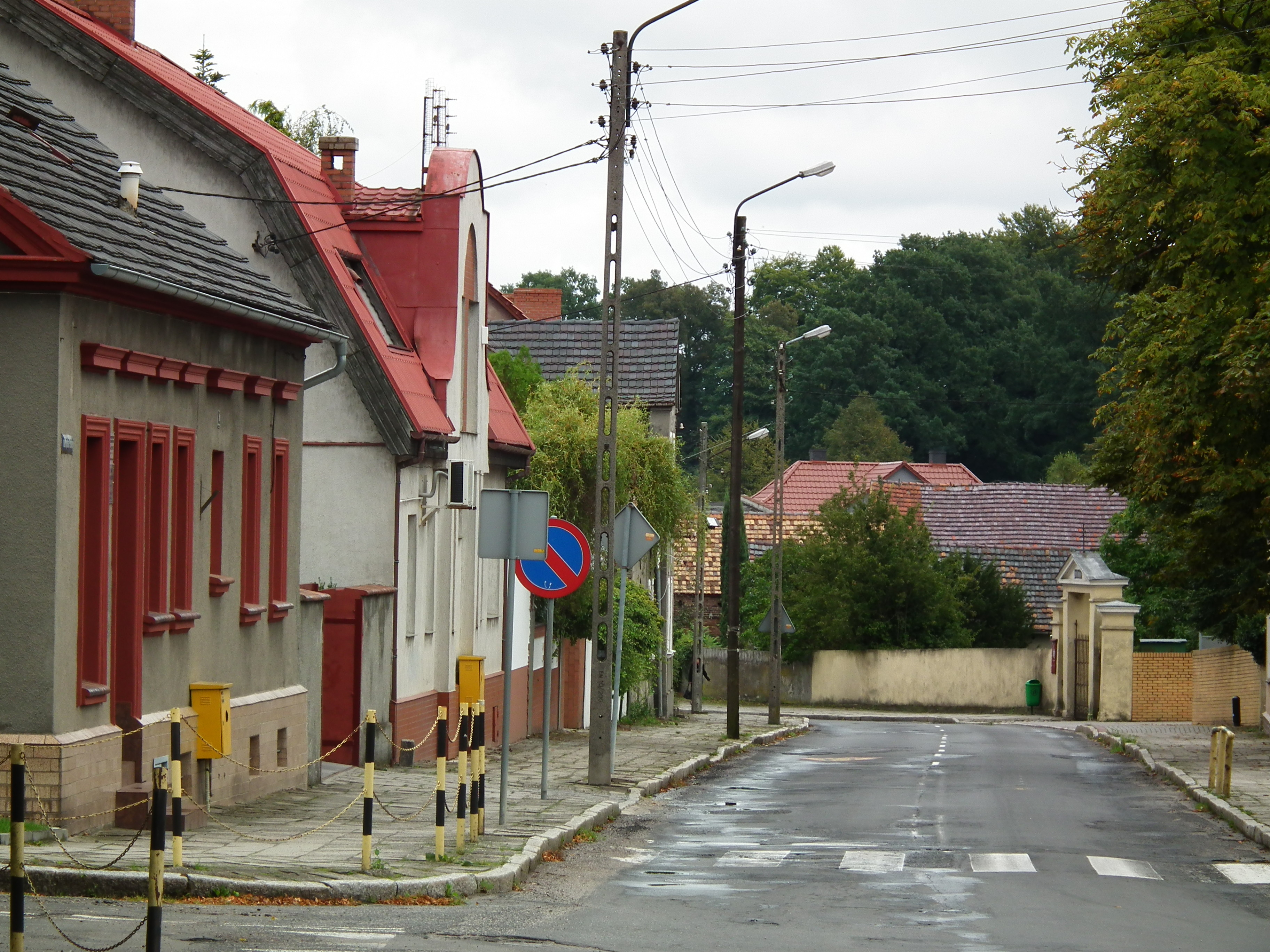 Widok miejski z Gozdnicy.